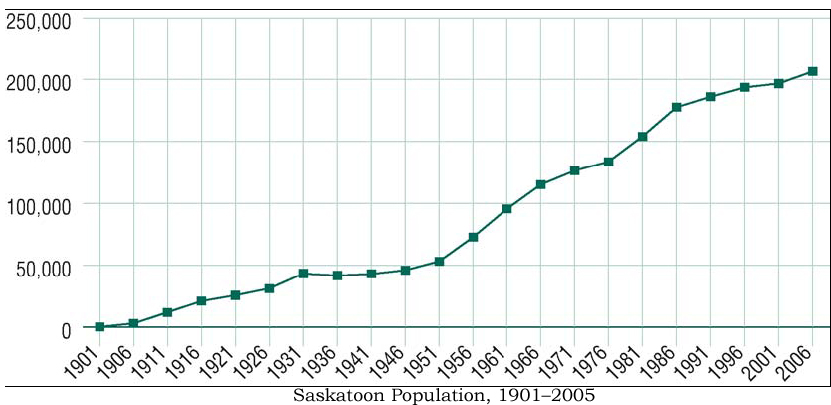 Saskatoon Population, 1911–2005 Saskatoon, Saskatchewan, Canada